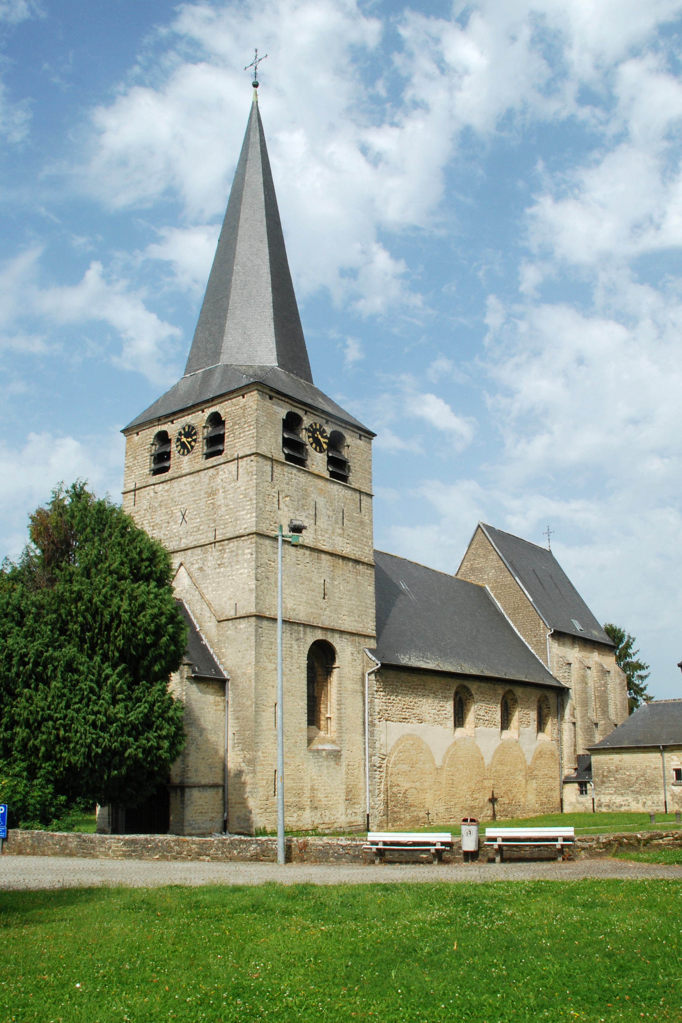 Belgique - Brabant flamand - Herent - Église Notre-Dame de Winksele